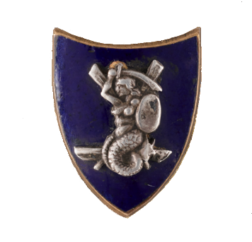 Warszawski Klub Wioślarek - herb klubu (odznaka)